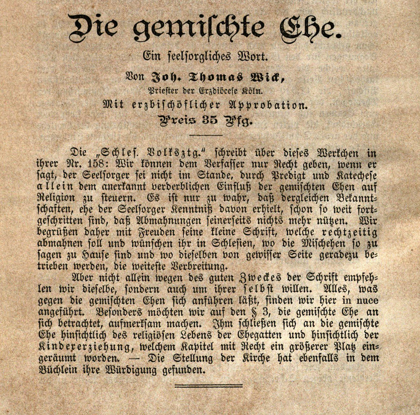 Werbung für ein Buch gegen katholisch-protestantische "Mischehen". Abgedruckt in einem Buch, das sich kritisch mit der Kölnischen Zeitung auseinandersetzt.